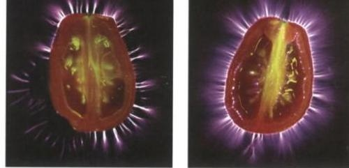 Fotografia Kirlian di un pomodoro prima e dopo la cottura